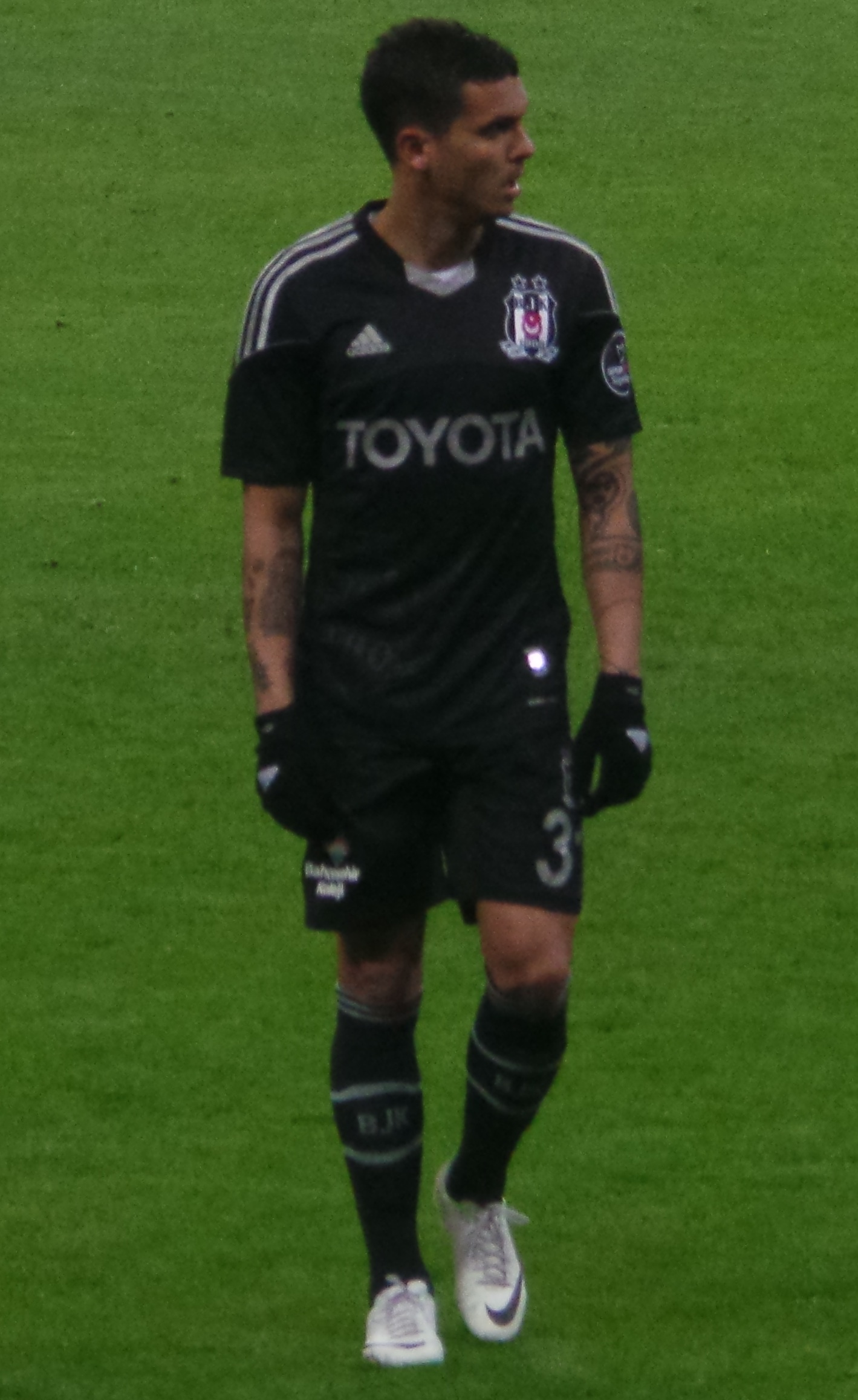 Ramon motta